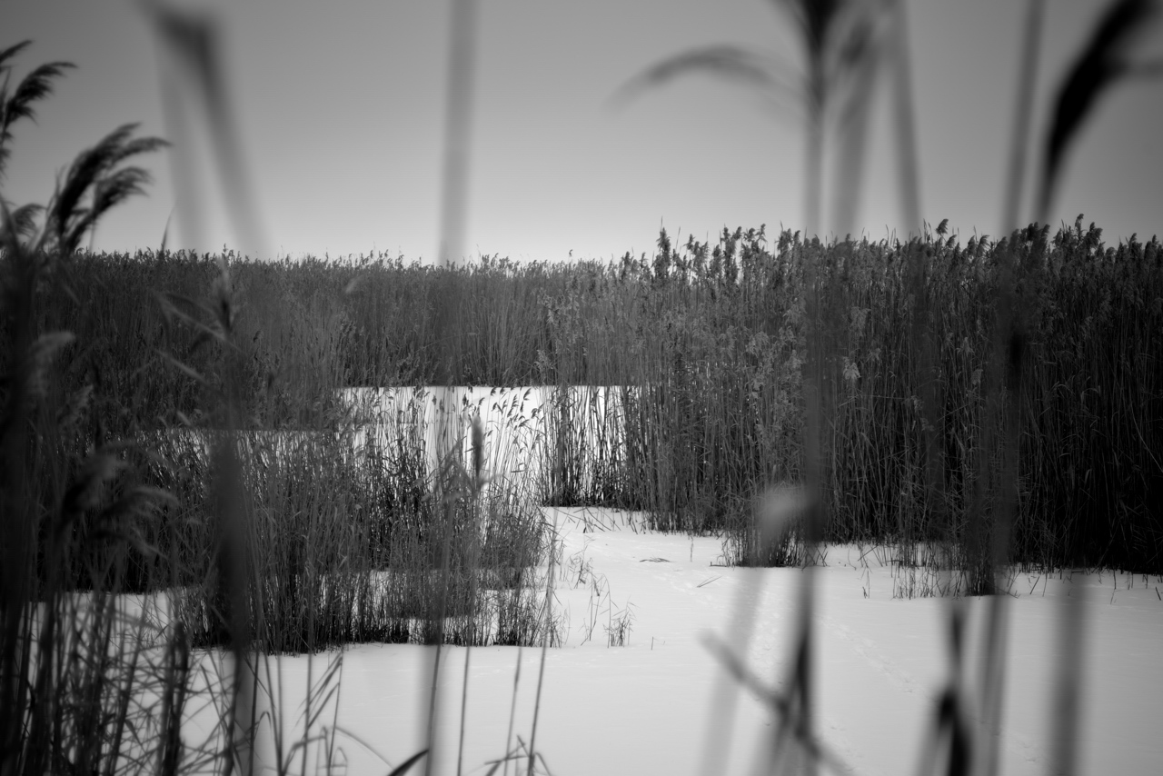 Малоперещепинський, Новосанжарський р-н, між селами Мала Перещепина та Маньківка